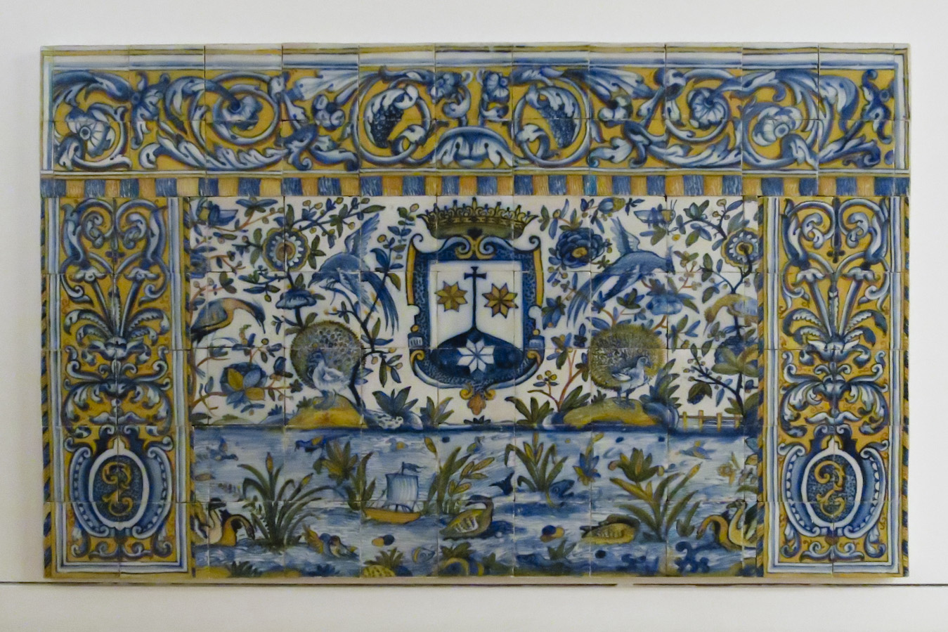 Frontal de altar, azulejos, séc. XVII, Museu Nacional de Machado de Castro